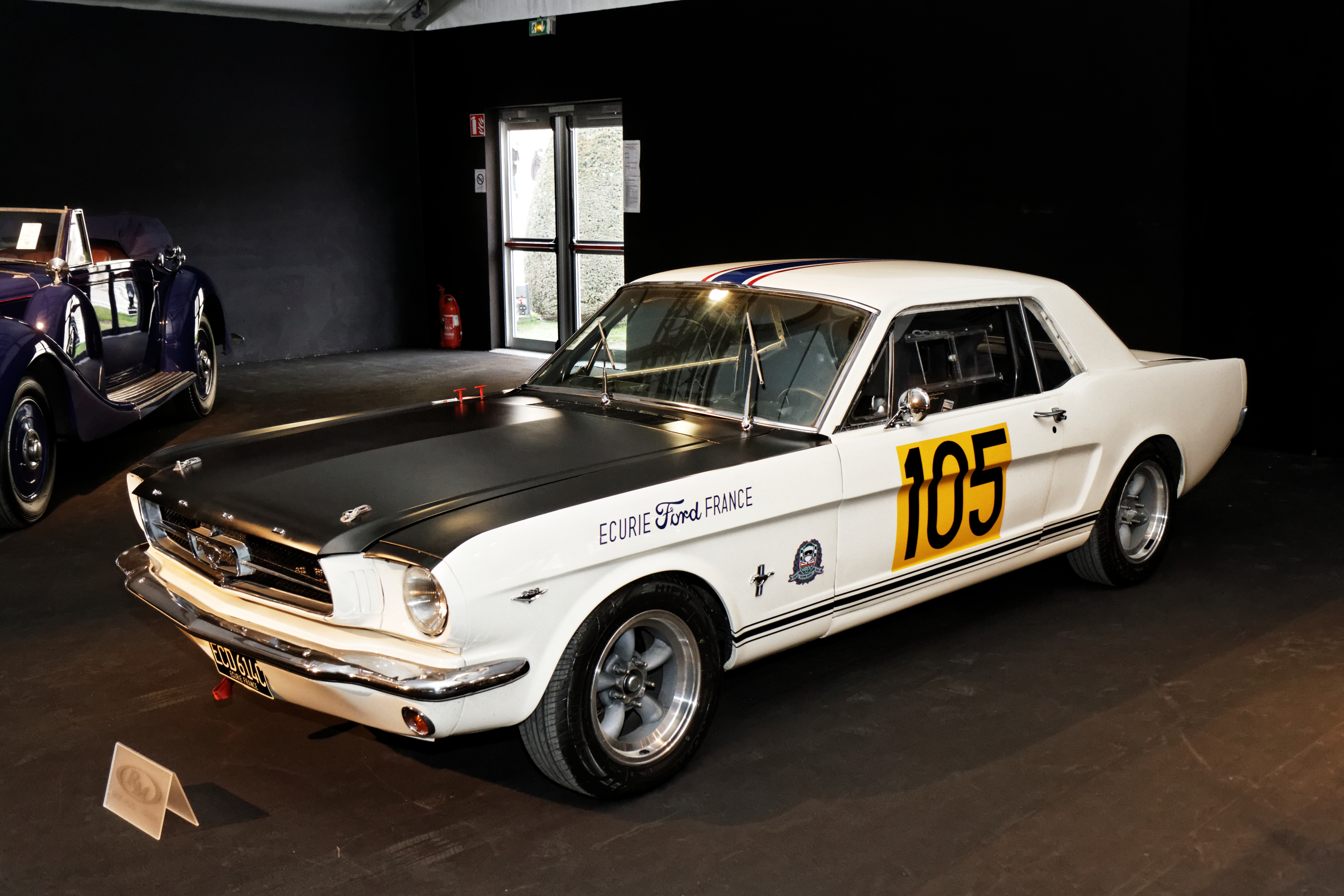 Une Ford Mustang 289 Racing Car de 1965.